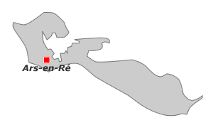 Situation d'Ars en Ré sur l'île de Ré